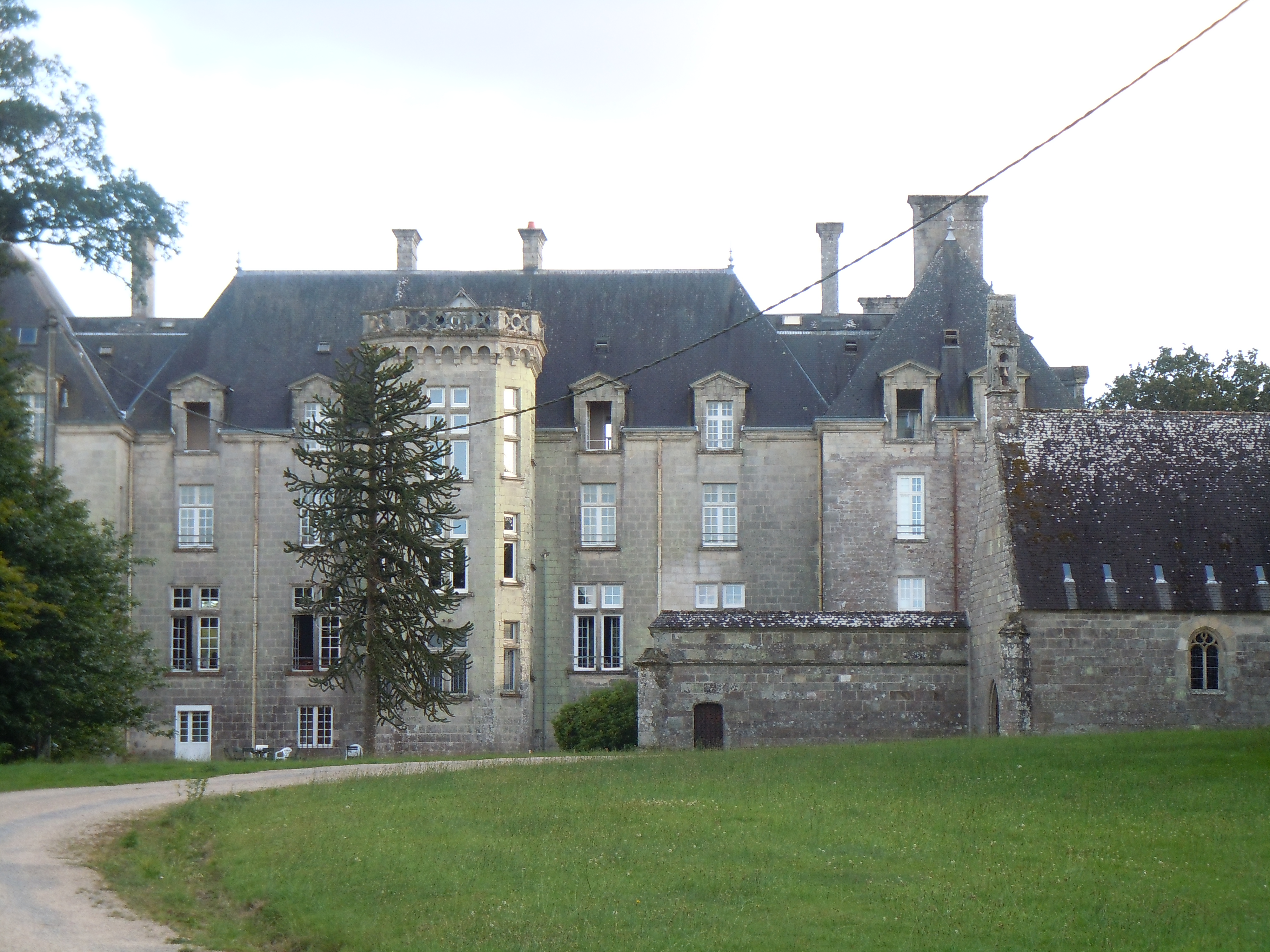 l'actuel château de Pontcallec situé à Berné dans le département du Morbihan